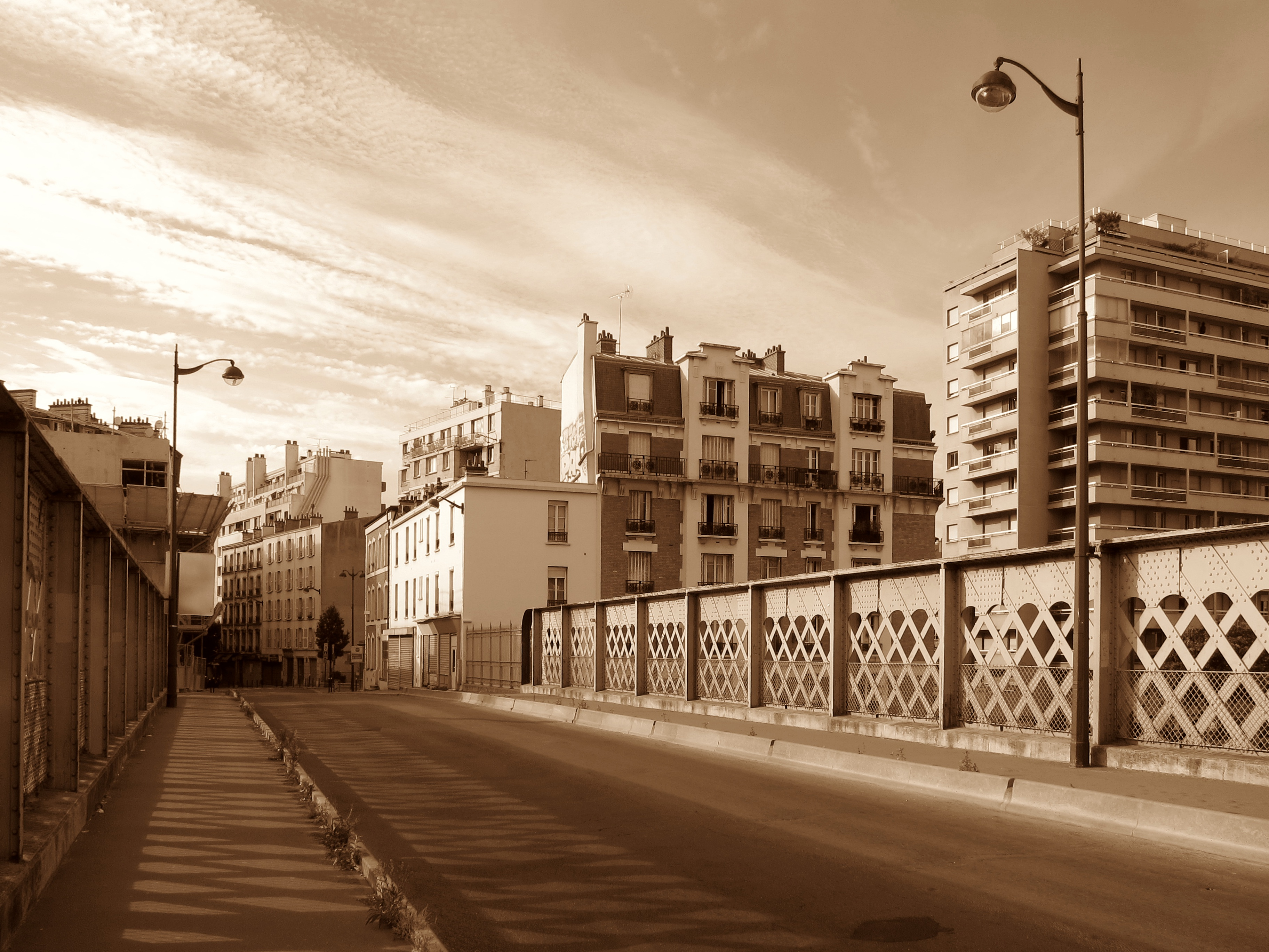 Paris (Île-de-France, France) : Rue l'Ourcq.